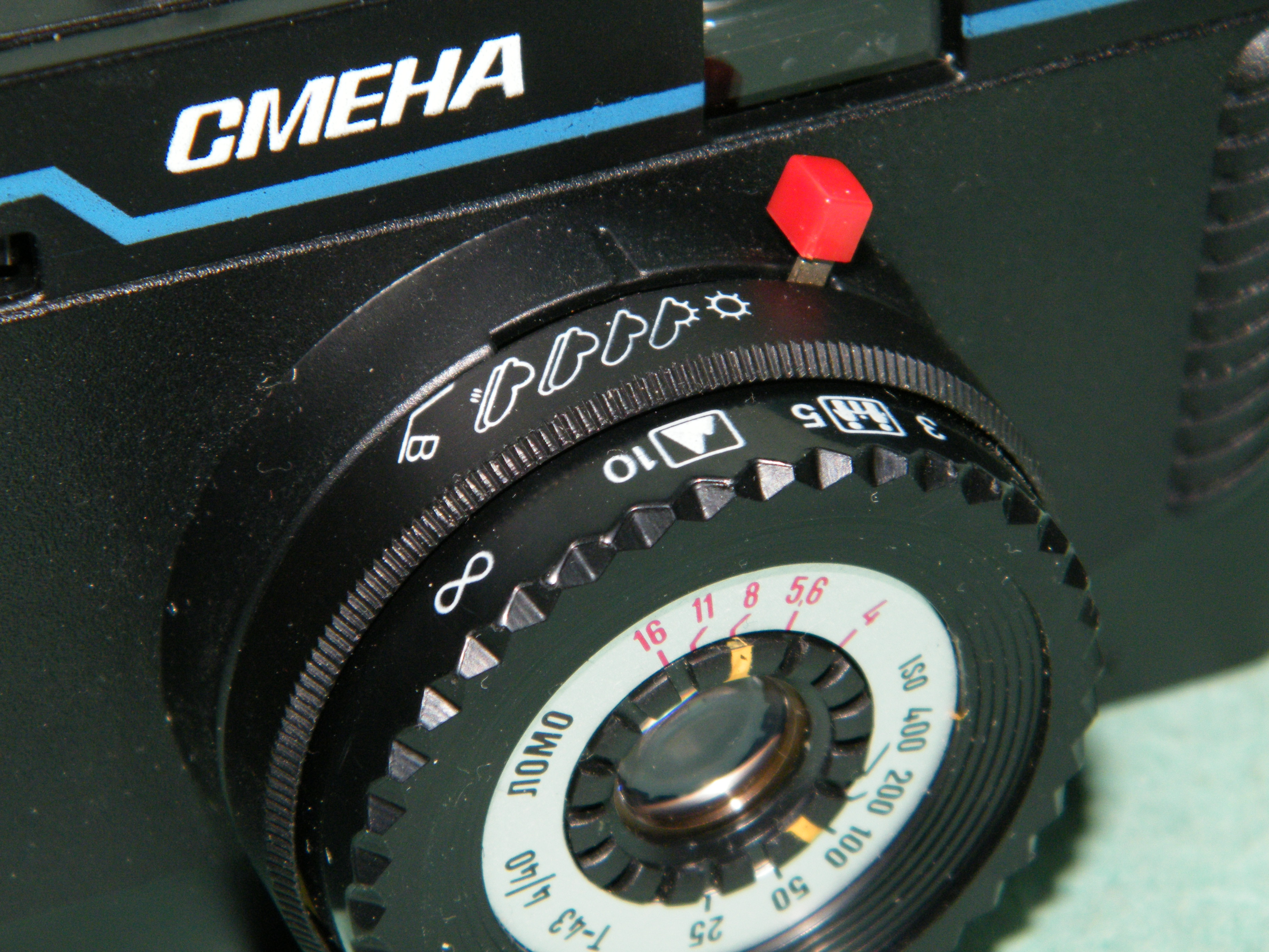 Фотоаппарат Смена-35. Советский Союз, Ленинград. 1990 год.